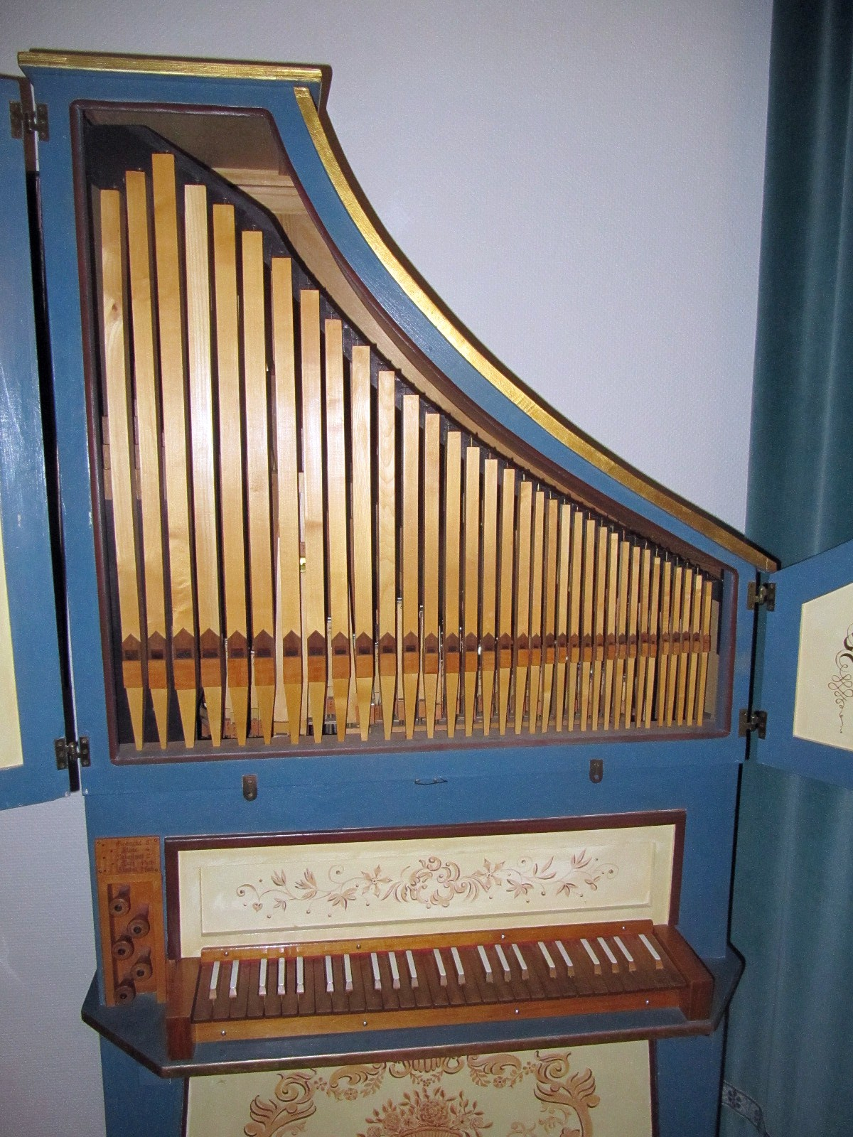 Orgelpositiv von Karl Bormann (in Privatbesitz)